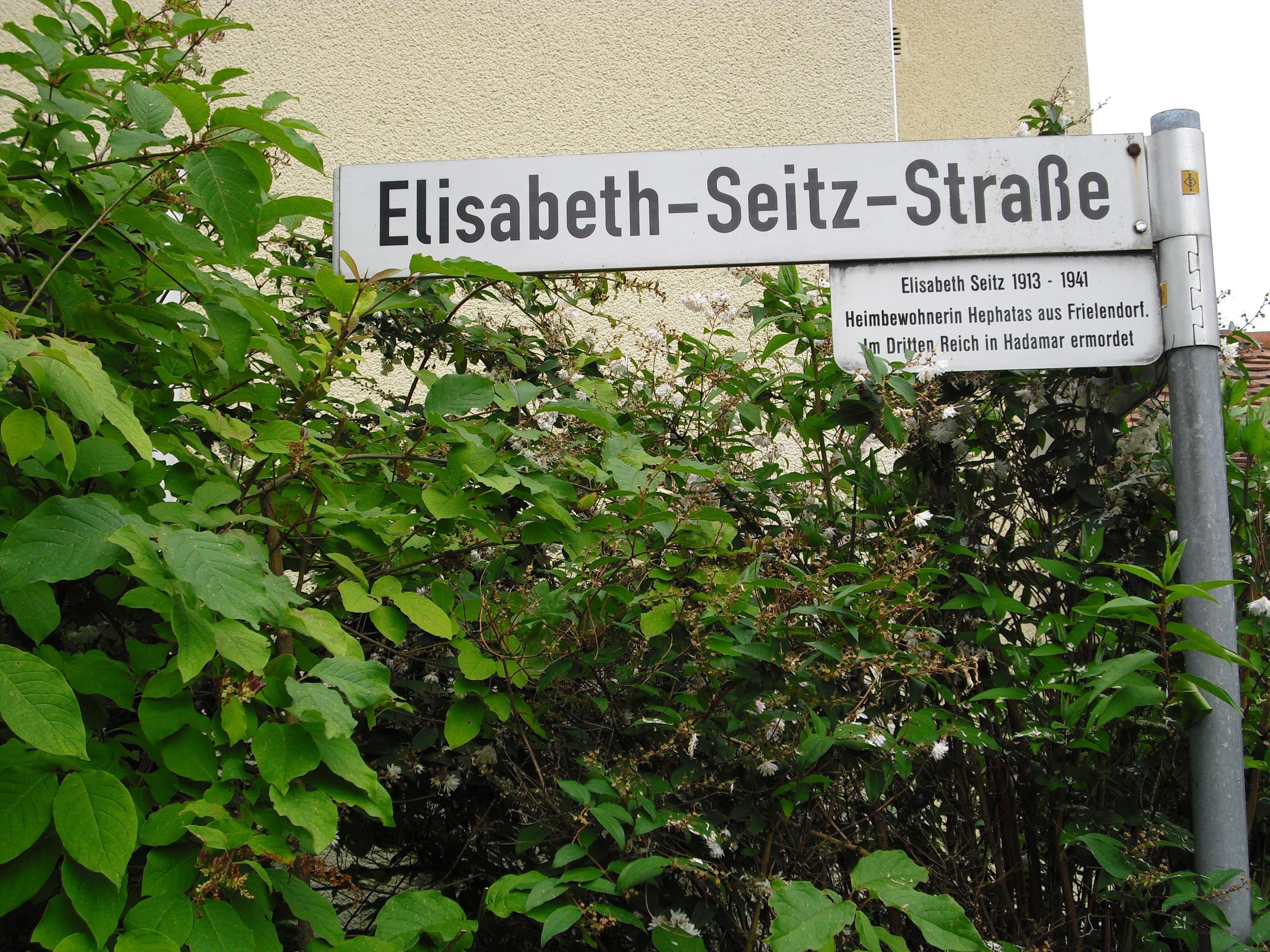 Straßenschild in Treysa - trägt den Namen Elisabeth Seitz, die als Behinderte in Hadamar ermordet wurde.